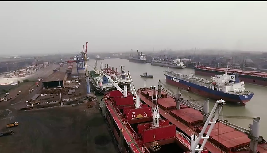 হলদিয়া বন্দর